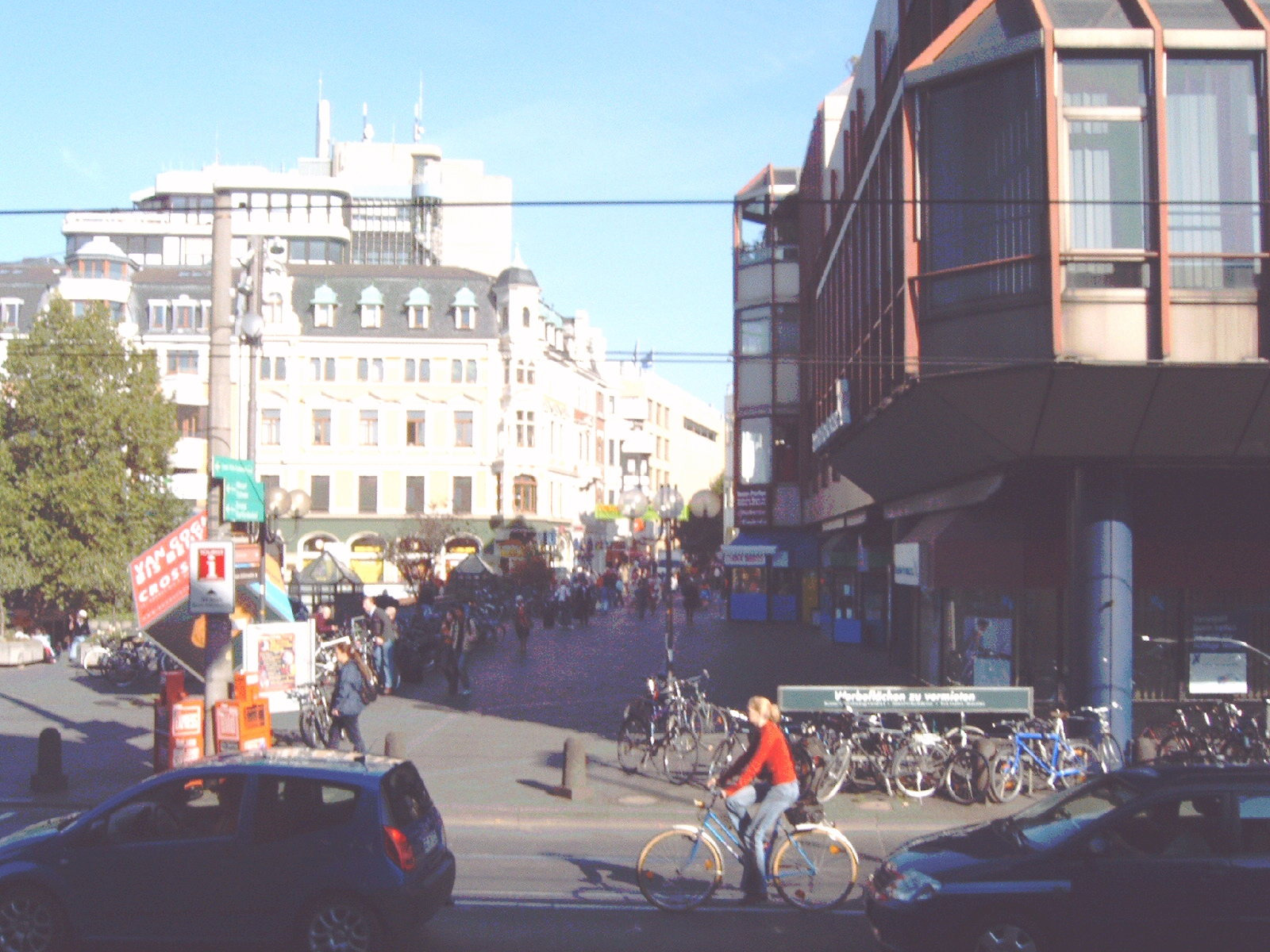 Bahnhofsvorplatz Bonn – Blick vom Hauptportal Richtung Poststraße – rechts die „Südüberbauung“